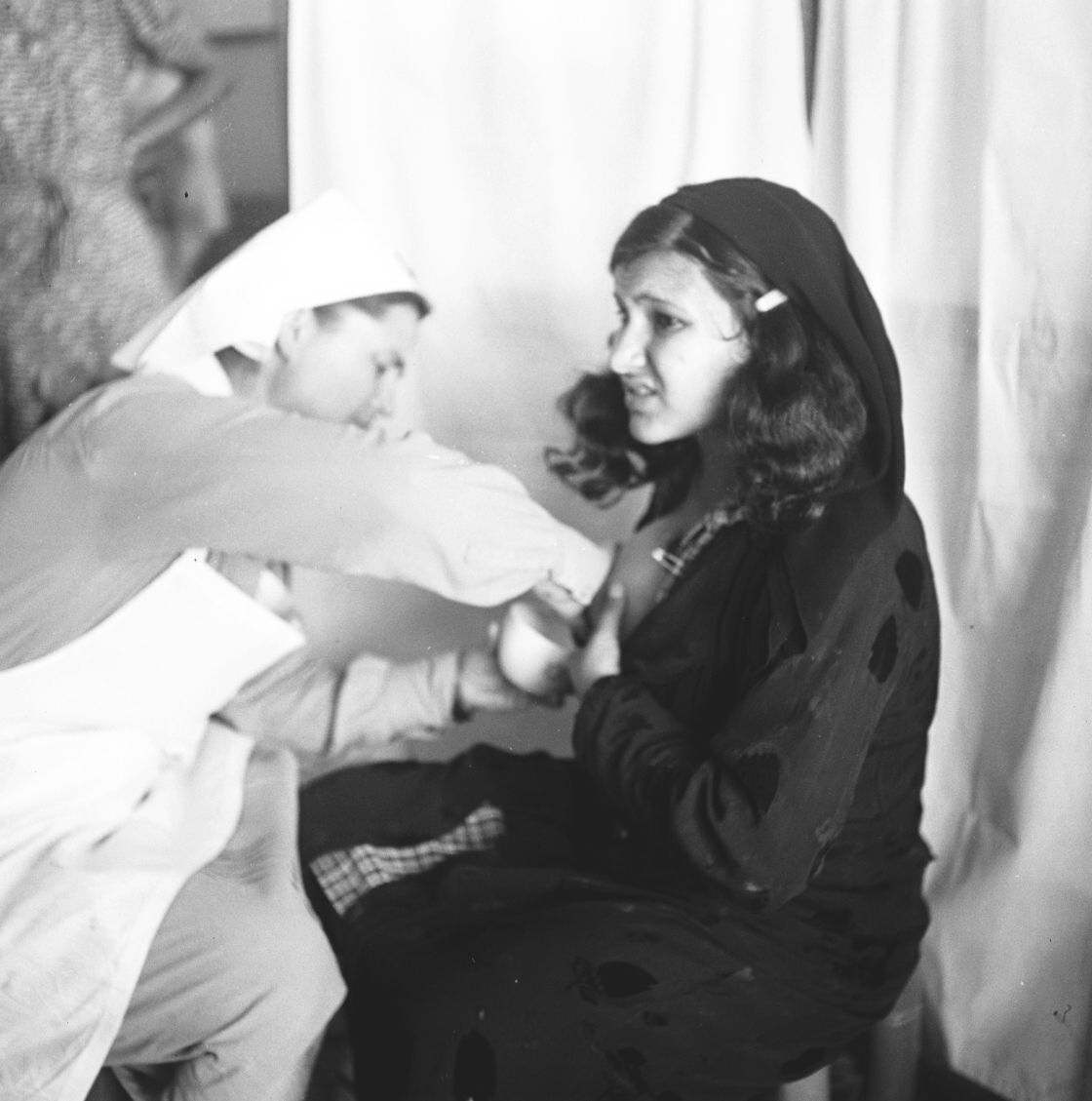 אוסף צילומים של הצלם זולטן קלוגר טווח מספרי התשלילים 24901 - 25061: הדסה טבריה